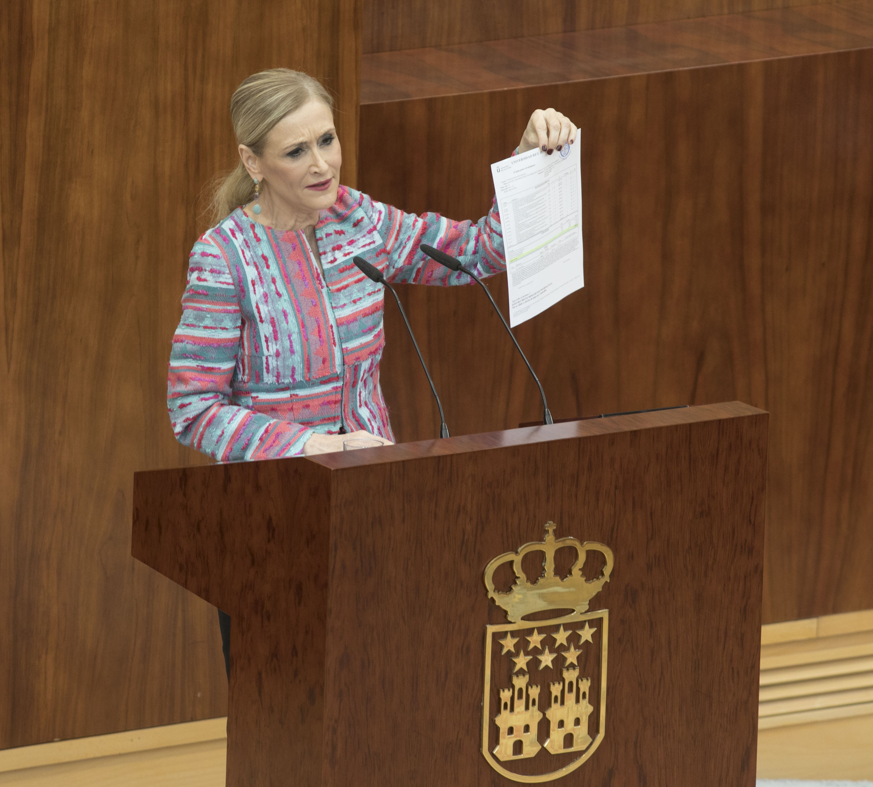 Hoy se celebra un pleno extraordinario en la Asamblea de Madrid. He aportado los datos, documentos y testimonios que desmontan la polémica del máster, y ningún ataque como éste, por feroz que sea, me va a apartar de la tarea que me encomendaron los madrileños en las urnas.Son días duros, de continuos ataques que han intentado destruirme personalmente, pero no voy a dejar de trabajar por los madrileños. Gracias a todos por vuestro apoyo. Seguimos.